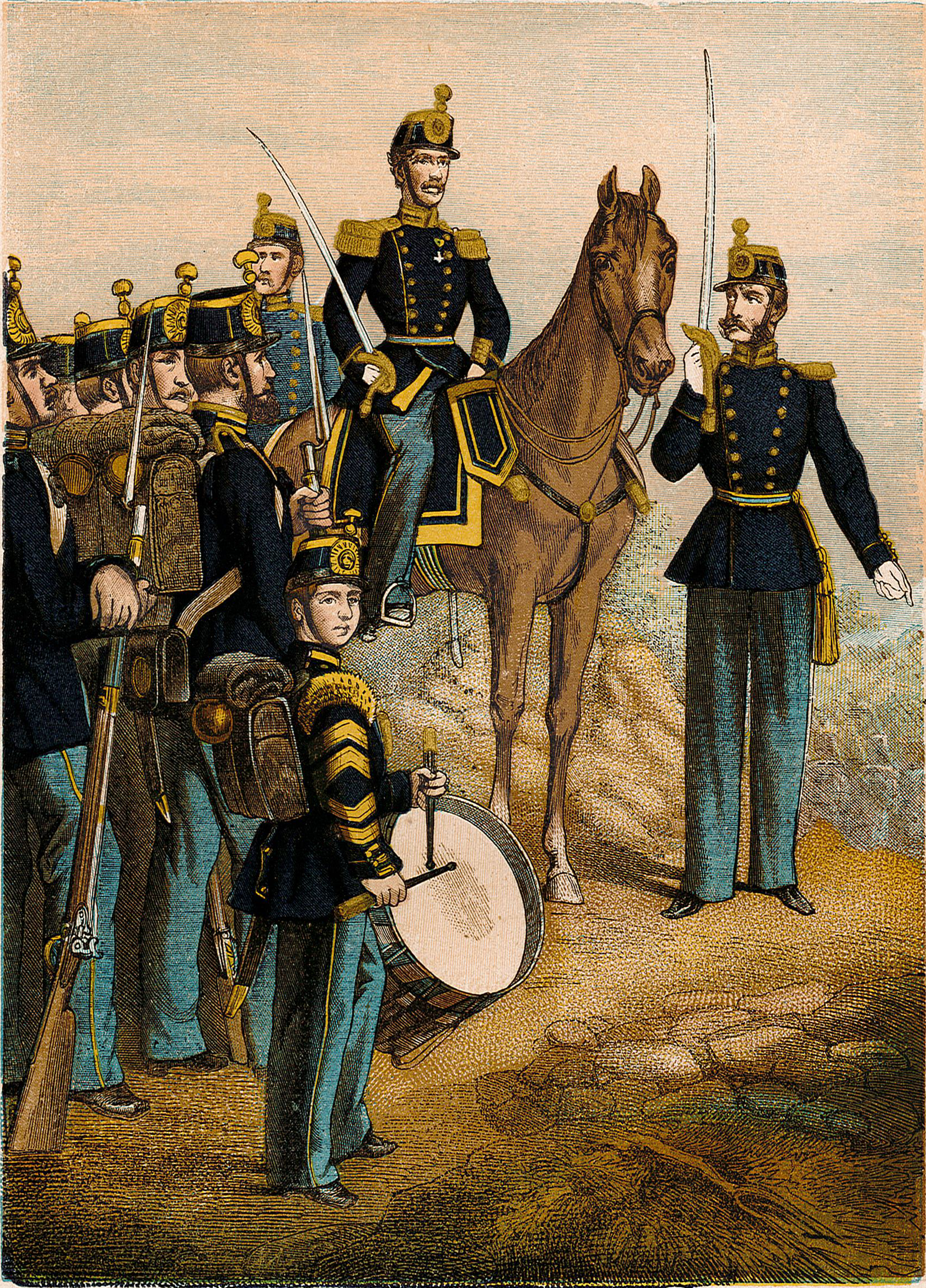 Uniformer för ”Kongl. Smålands Grenadier-Bataljon.”